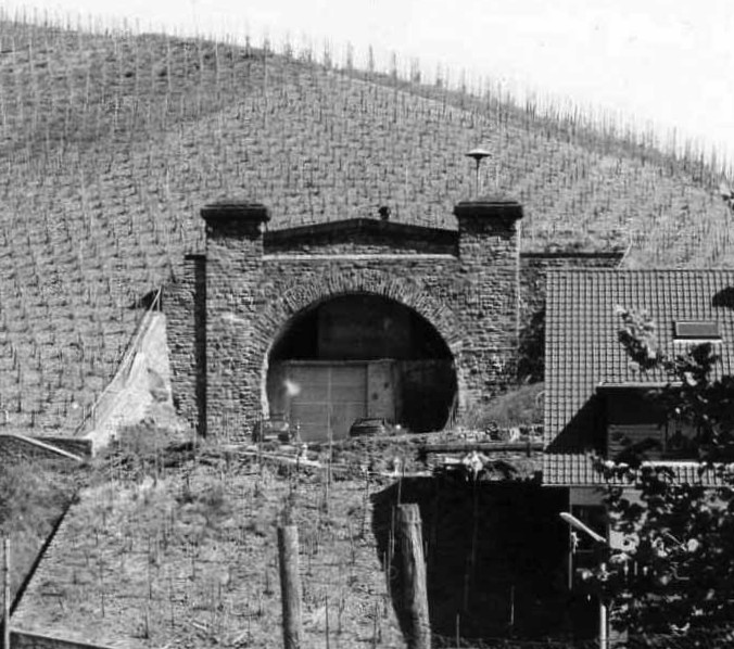 Einer der niemals von der Eisenbahn benutzten Tunnel, in denen der Regierungsbunker eingebaut wurde